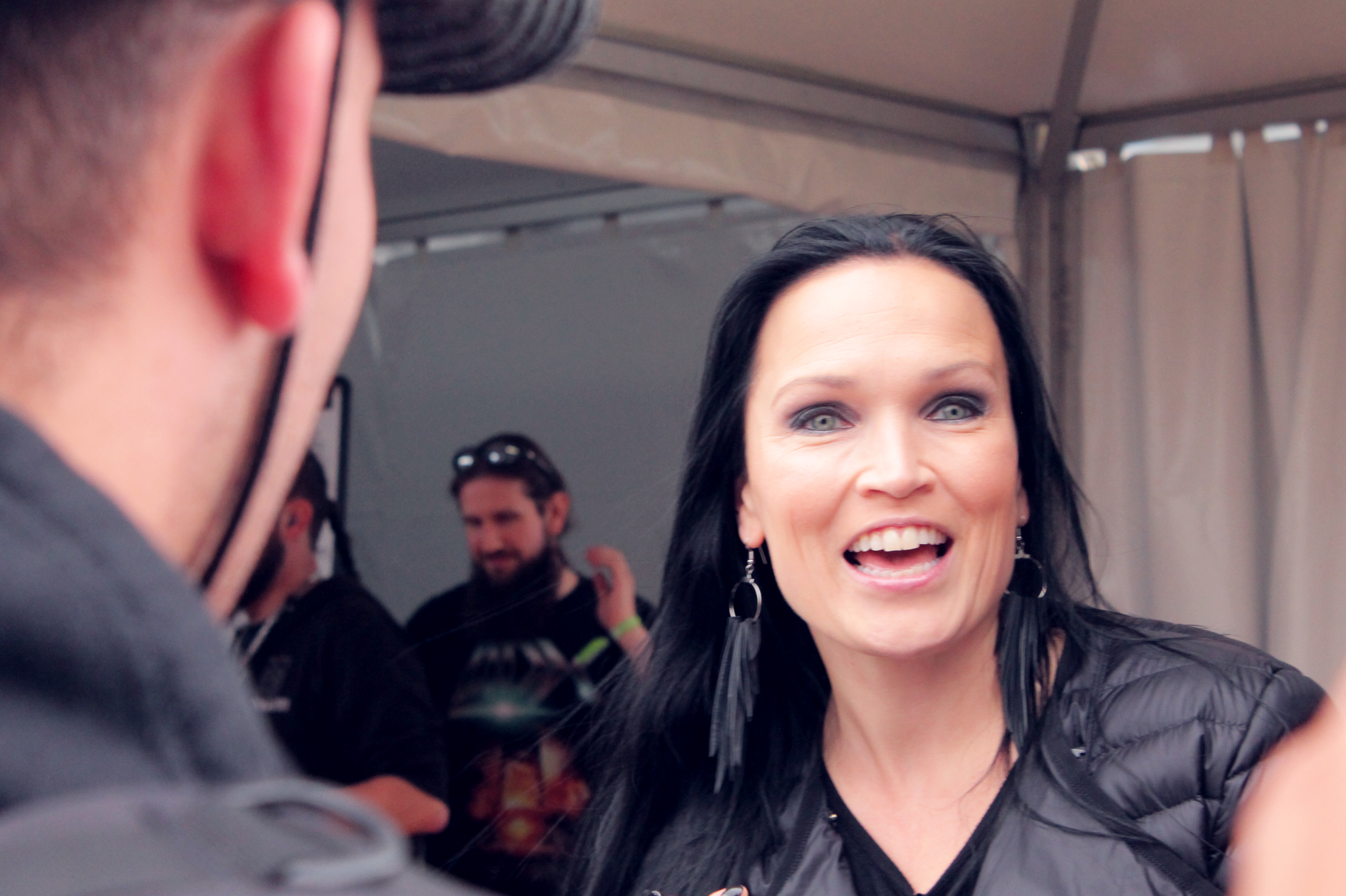 Tarja Turunen en dédicace au Hellfest 2016